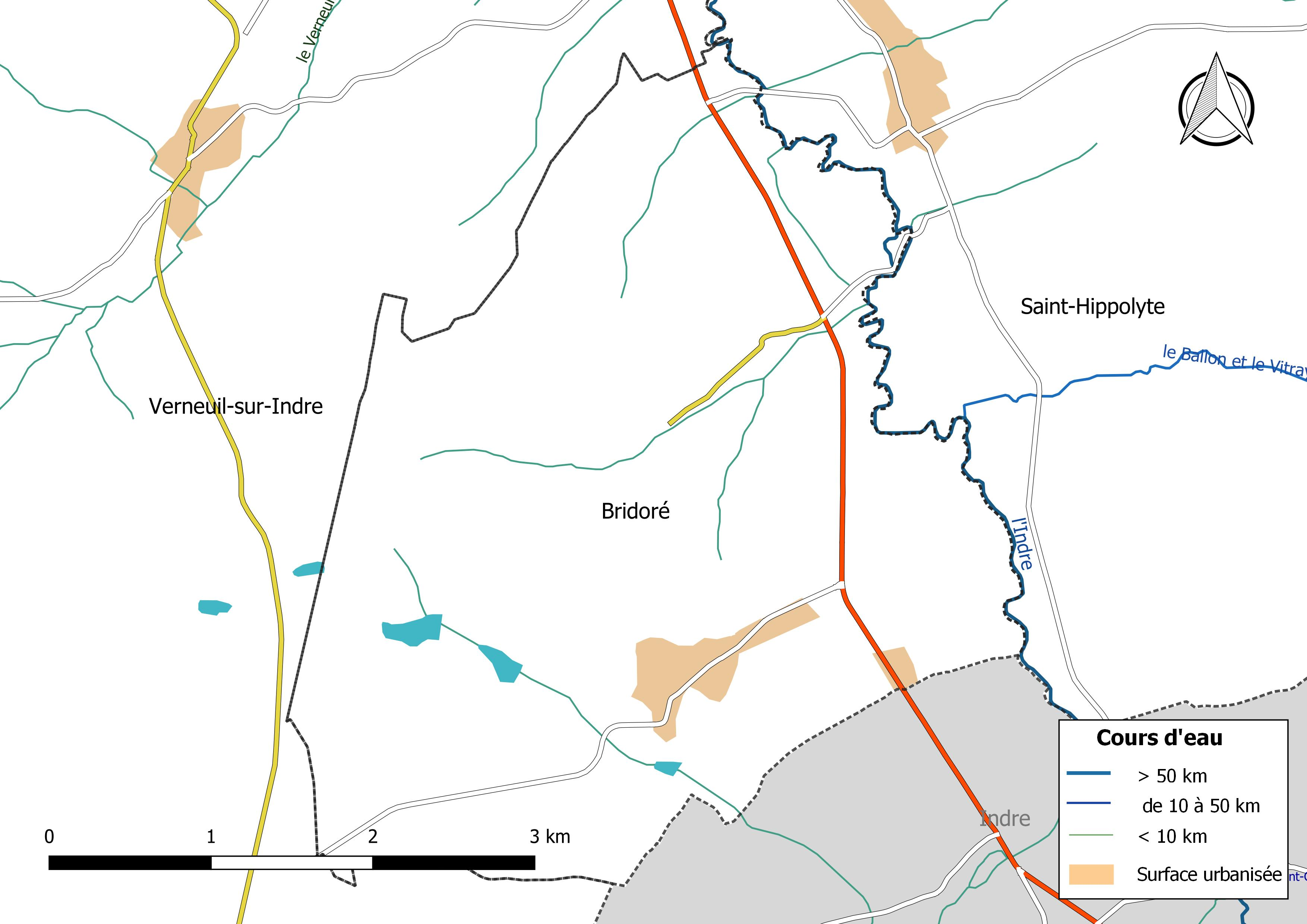 Carte du réseau hydrographique de la commune de Bridoré (France).